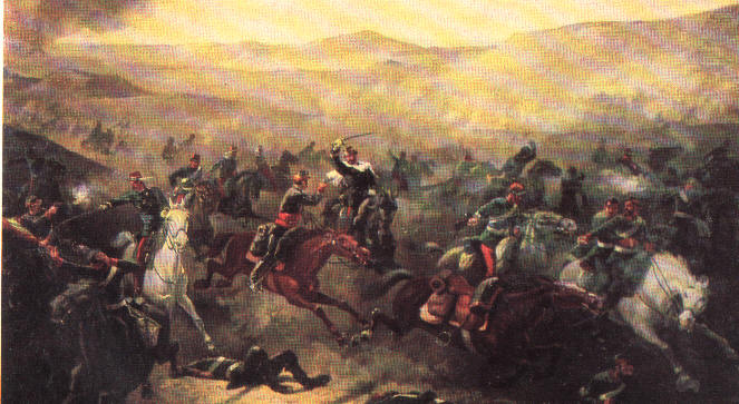 Combate de Pampa Germania, 6 de noviembre de 1879.